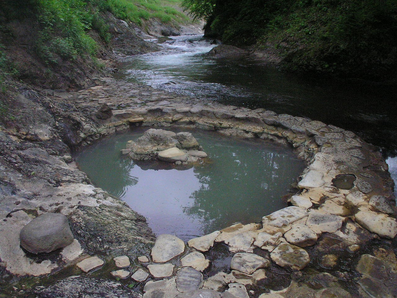 鹿の湯（しかのゆ）露天風呂